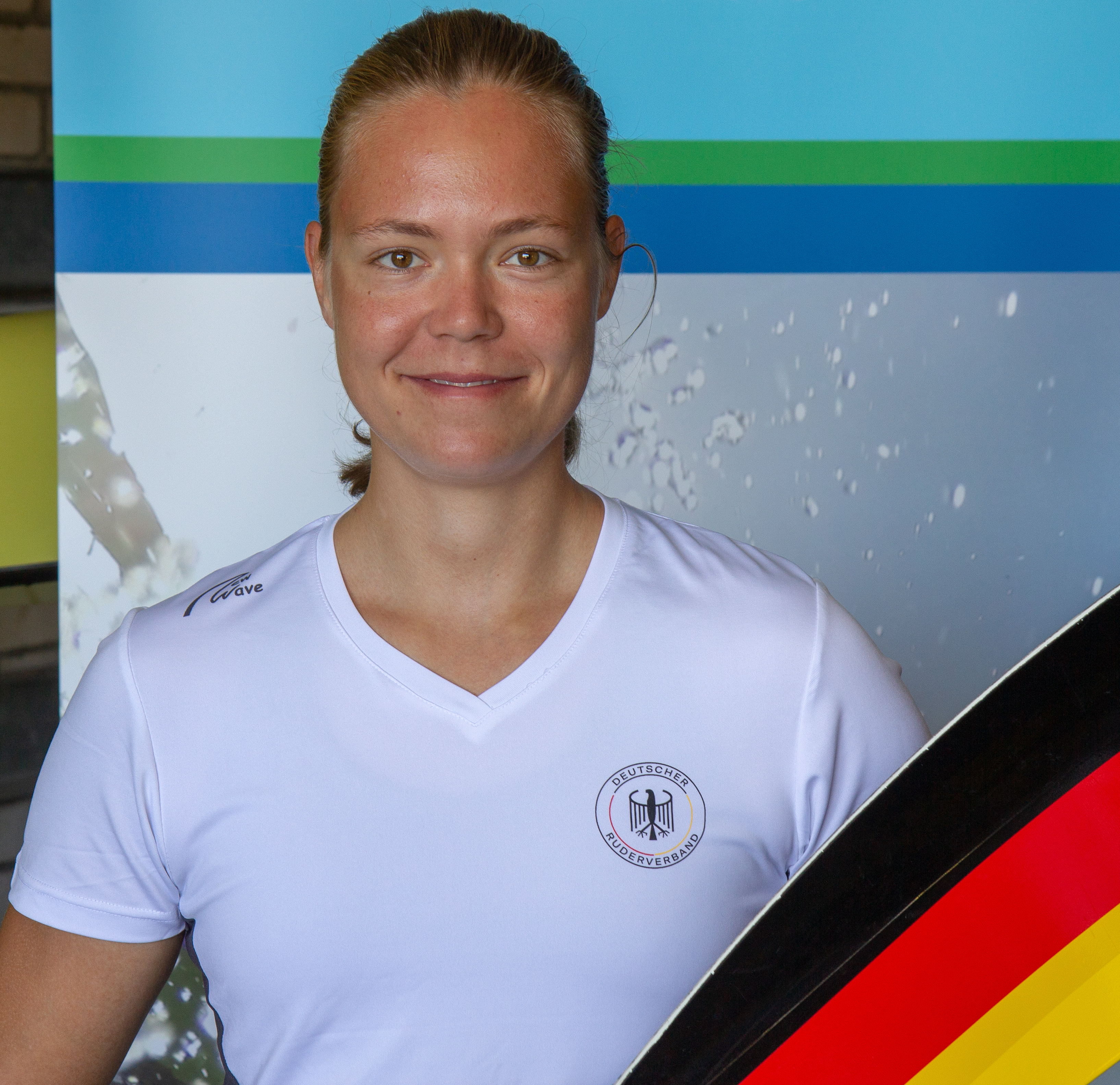 Alexandra Höffgen beim Medientag des Deutschen Ruderverbandes in der Ruderakademie Ratzeburg am 22. August 2018.